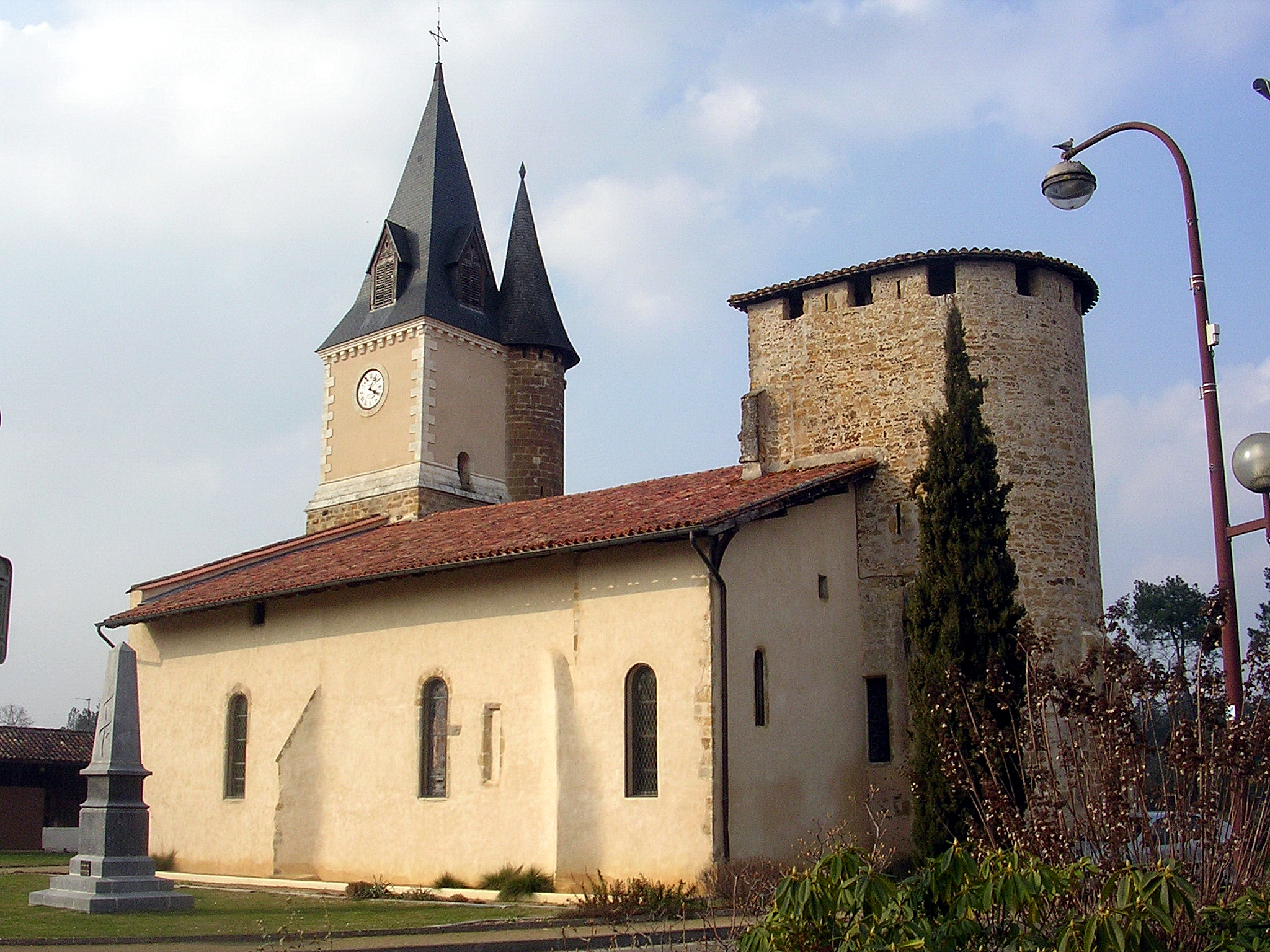 Eglise Saint-Médard de Geloux, dans le département français des Landes